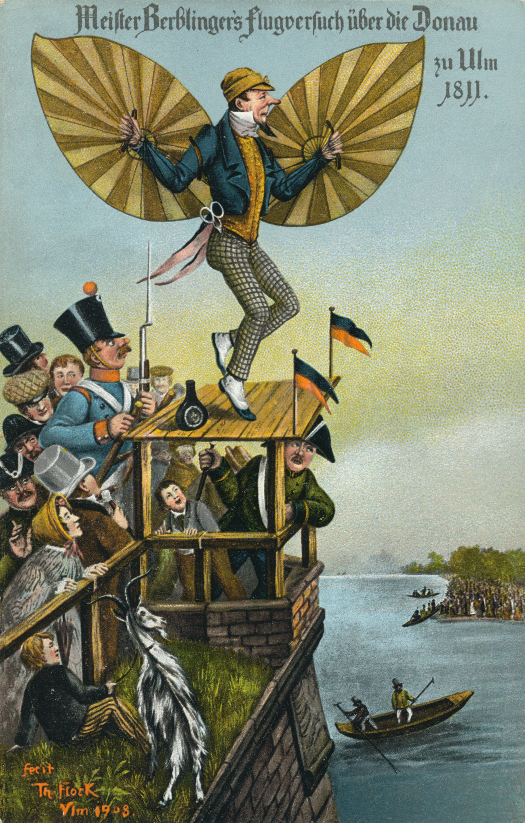 „Meister Berblinger's Flugversuch über die Donau zu Ulm 1811“